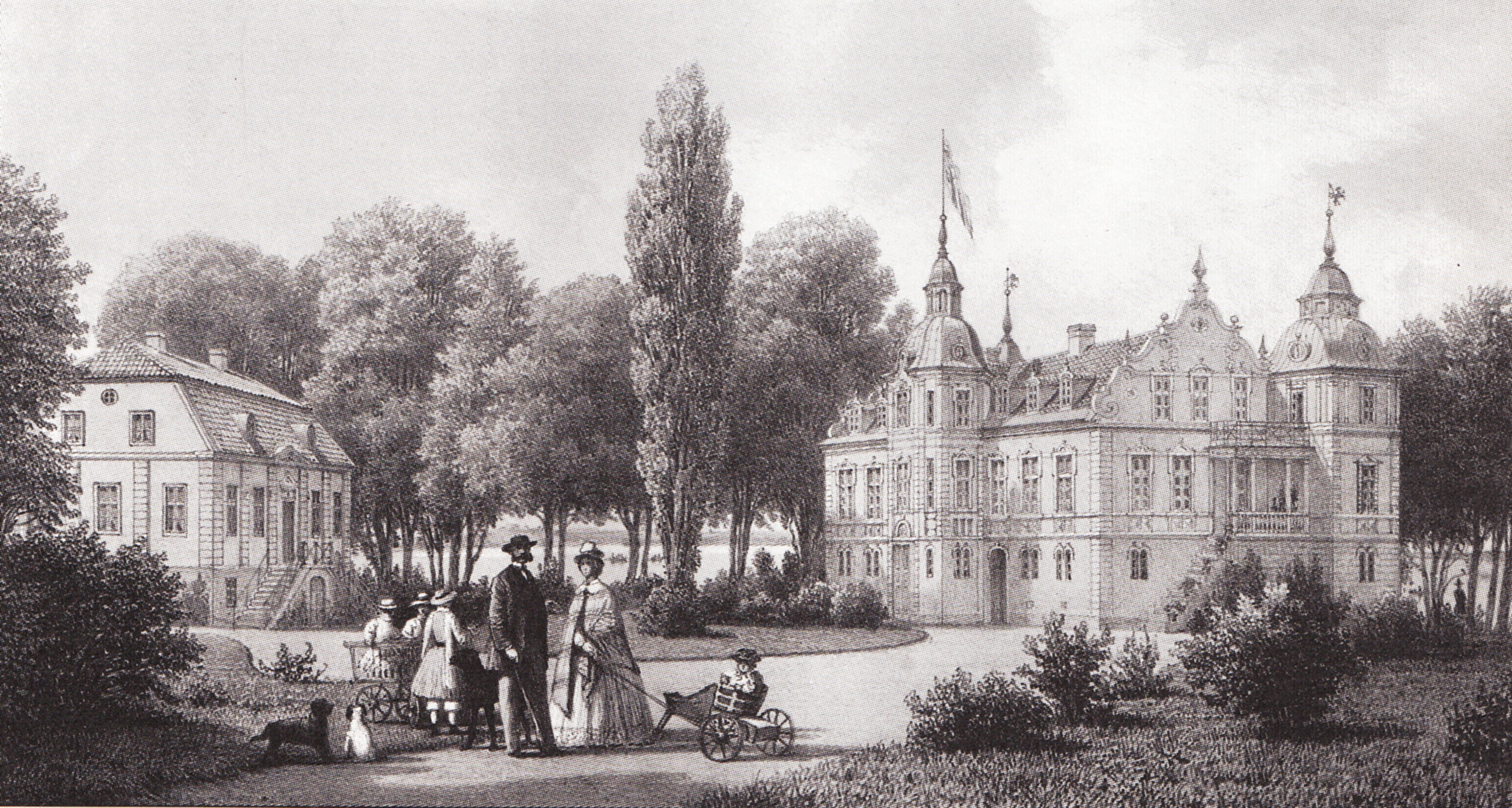 Sjöholms slott strax efter färdigställandet